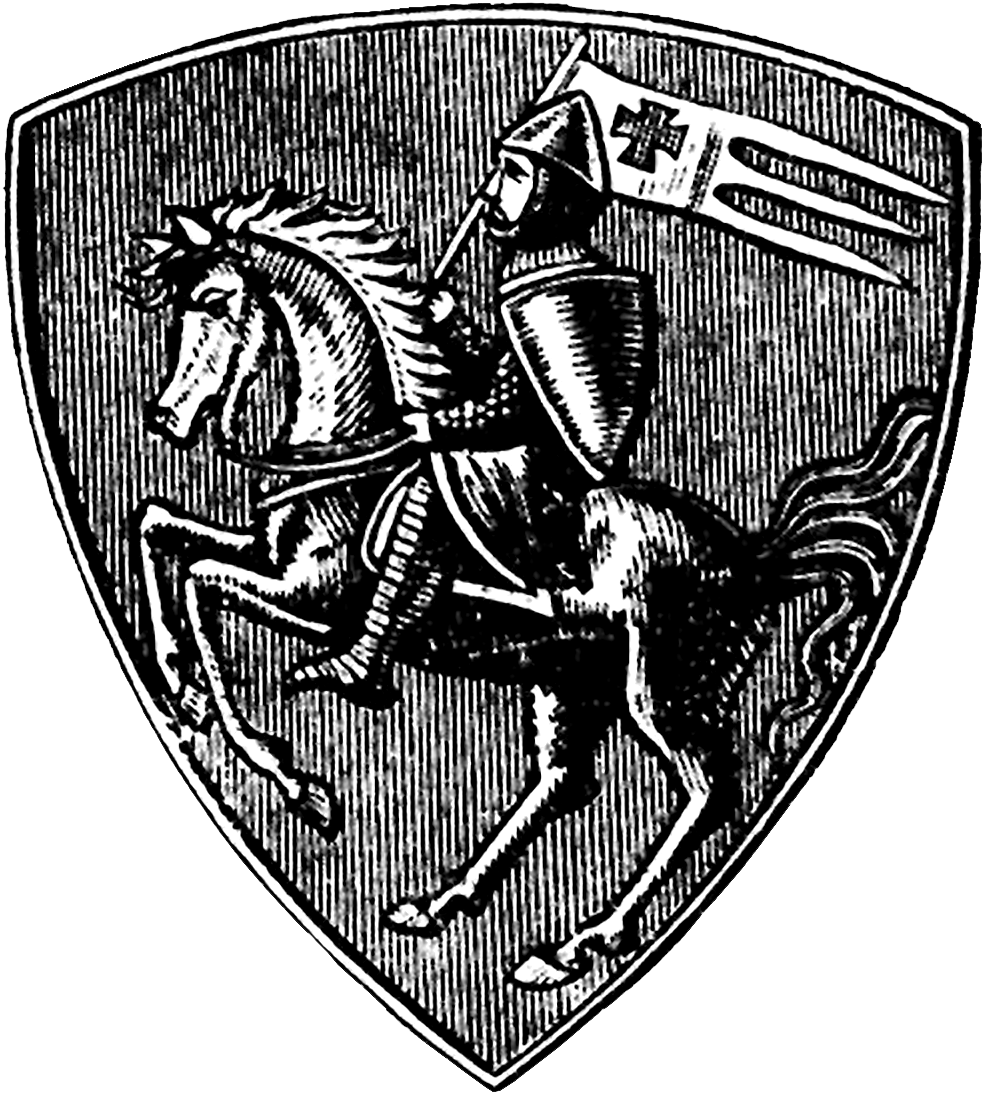 Герб Волынской земли. 1313